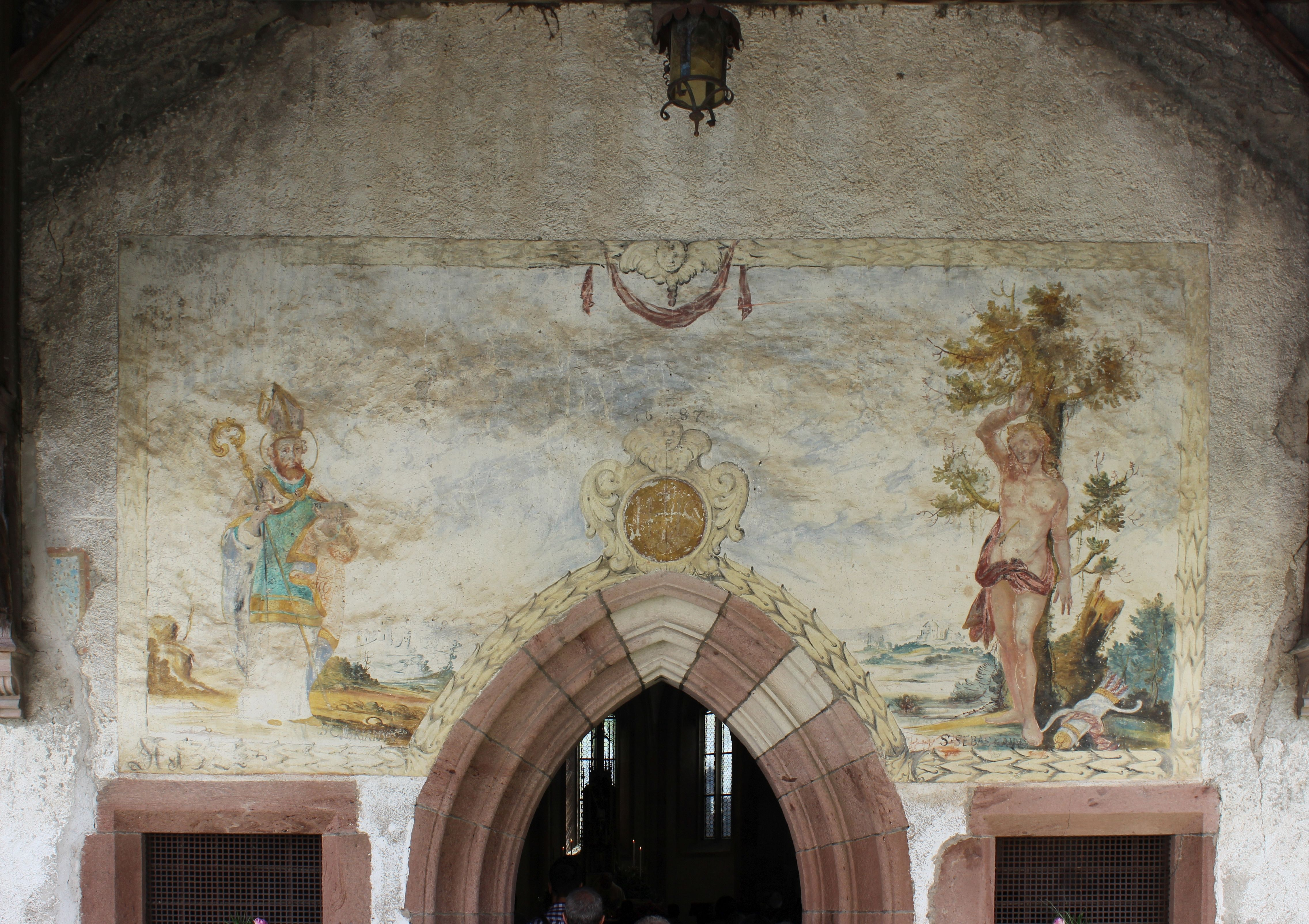 Fresken an St. Cyprian in Sarnthein (Südtirol)